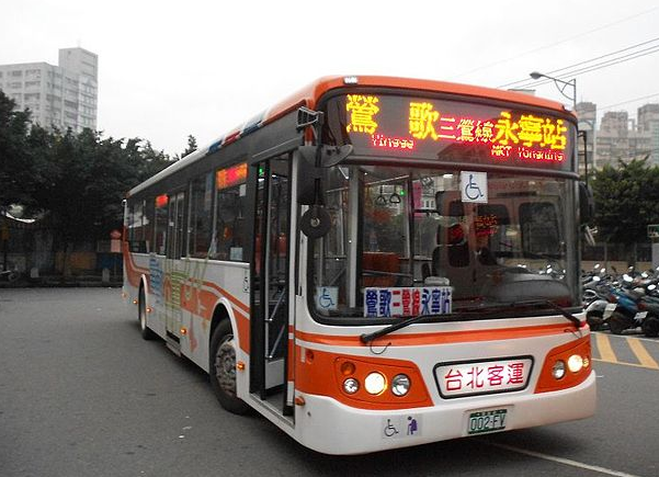 台北客運華德動能科技RAC12LB150電動低底板公車002-FV行駛台北捷運三鶯線先導公車。